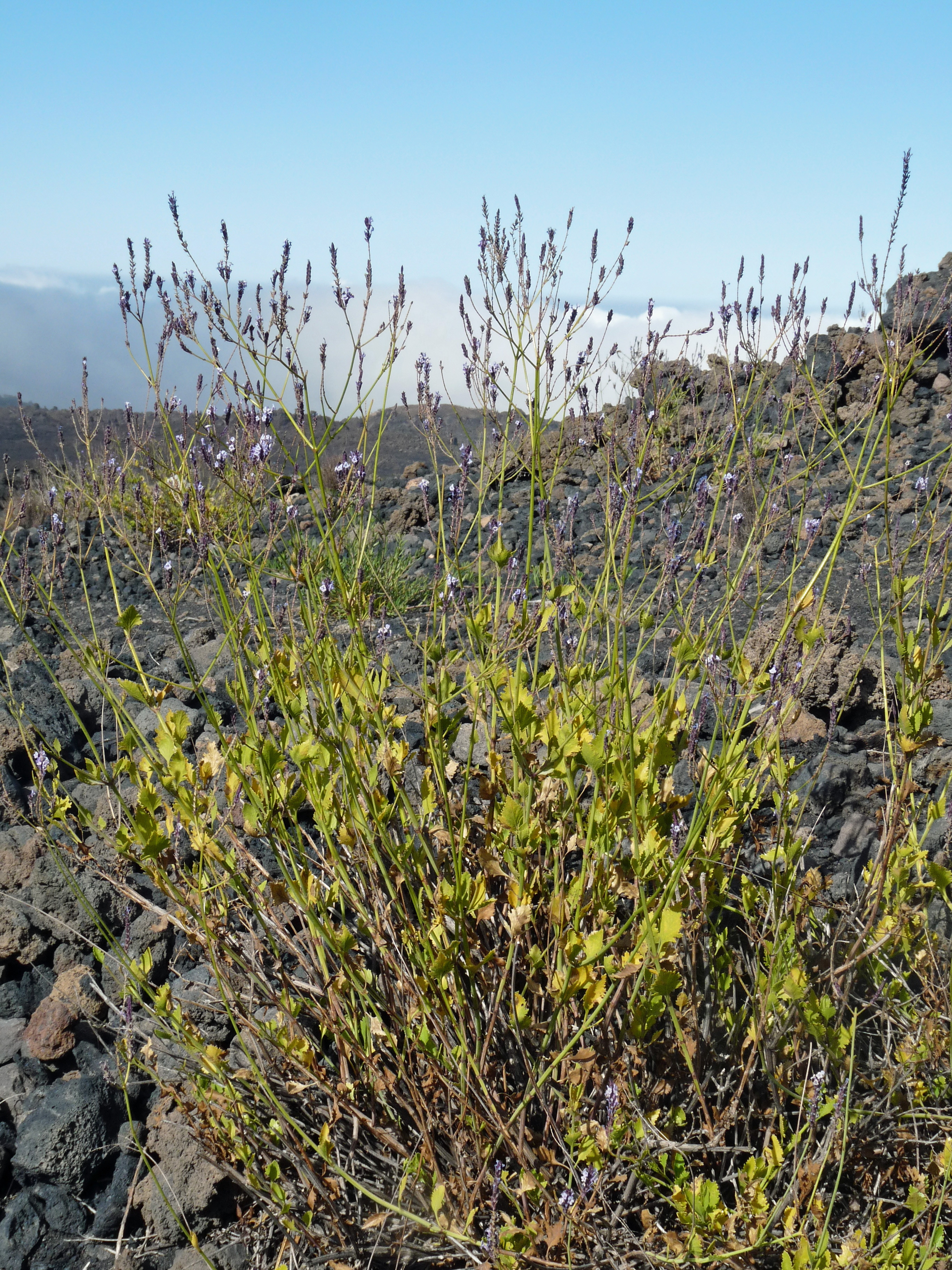 Chã das Caldeiras (île de Fogo, Cap-Vert) : Lavandula rotundifolia, espèce endémique